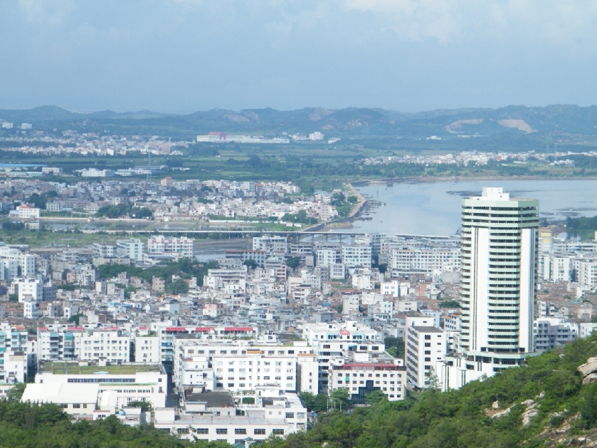 濠城